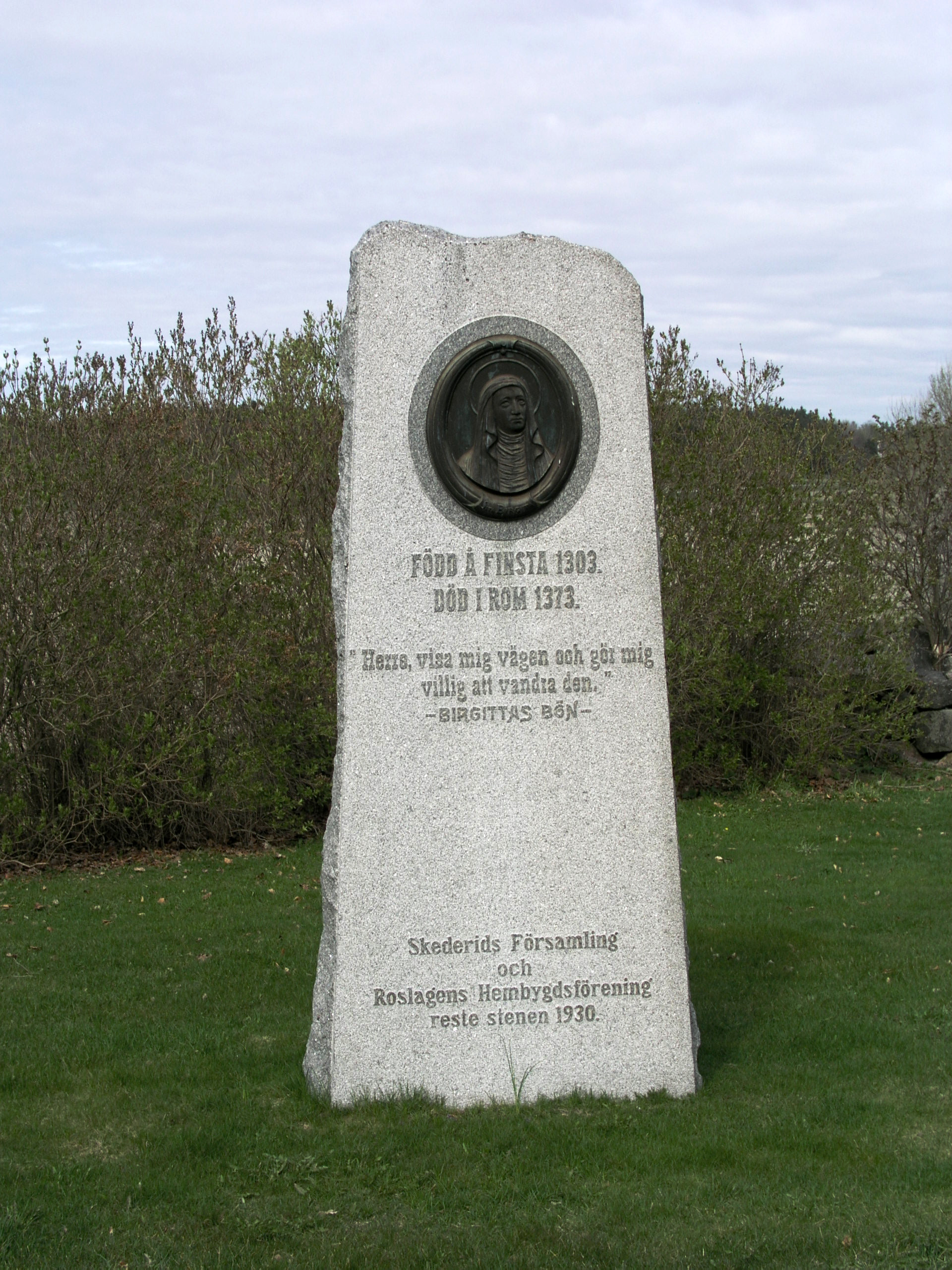 Skederids kyrka / Skederids church, Diocese of Uppsala, Norrtälje kommun. Memorial stone of Sankta Birgitta / Saint Bridget